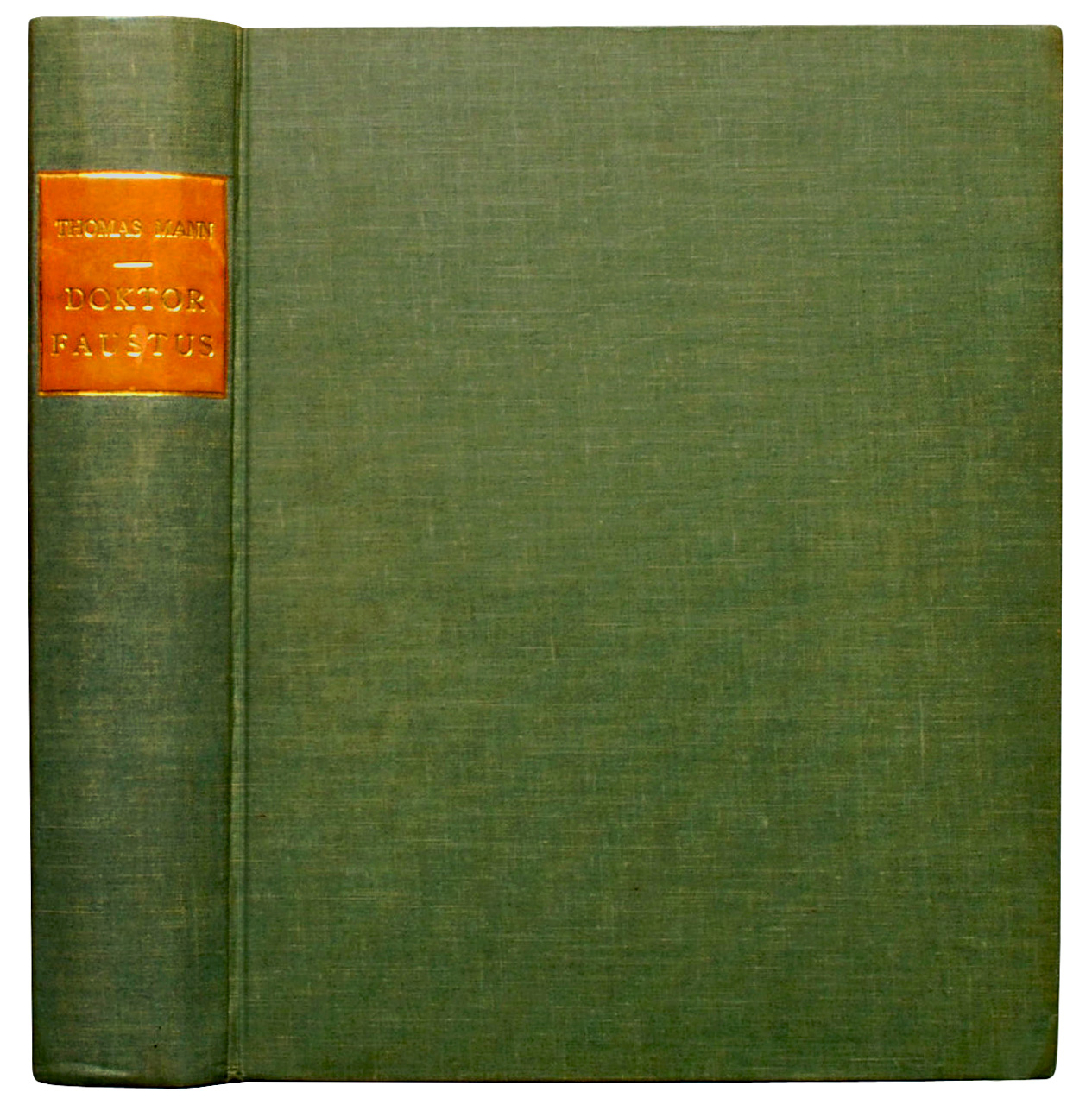 Mann, Thomas: Doktor Faustus. Das Leben des deutschen Tonsetzers Adrian Leverkühn, erzählt von einem Freunde.Copyright, 1947, by Thomas Mann. Manufactured in the United States of Amerika. 754 S., 1.Auflage (Potempa D 10.1). Orig.-Leinen 27,5 x 21 cm. Erst- und Vorzugsausgabe, Exemplar 49 von 50 nummerierten und signierten Expl. plus 8 weiteren signierten Expl. mit den Buchstaben A -H. Als Wachsmatrizen-Abzug in Handarbeit gefertigt. "Man hat hier von dem Original eine mimeographierte, signierte und gebundene Luxus-Auflage von 50 Stück zum Preis von 60 Dollar hergestellt, die dem Copyright-Amt zugleich für die nicht in Amerika fabrizierte gedruckte deutsche Ausgabe angenommen wurde." (Thomas Mann am 26.10.1947 an Ida Herz).